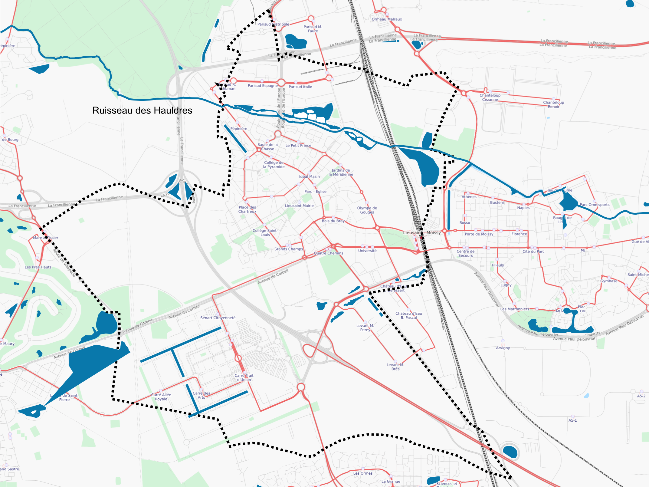 Carte du réseau hydrographique de la commune de Lieusaint (Seine-et-Marne) (France)